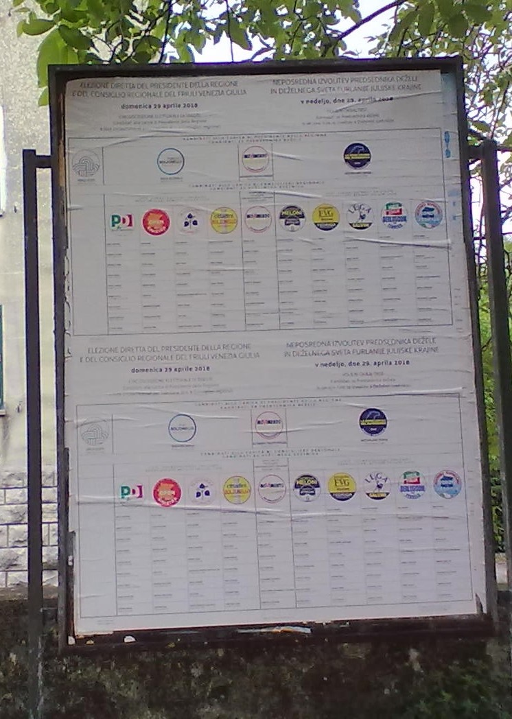 Tabellone riportante le liste e i candidati per la circoscrizione di Trieste alle elezioni regionali del 2018